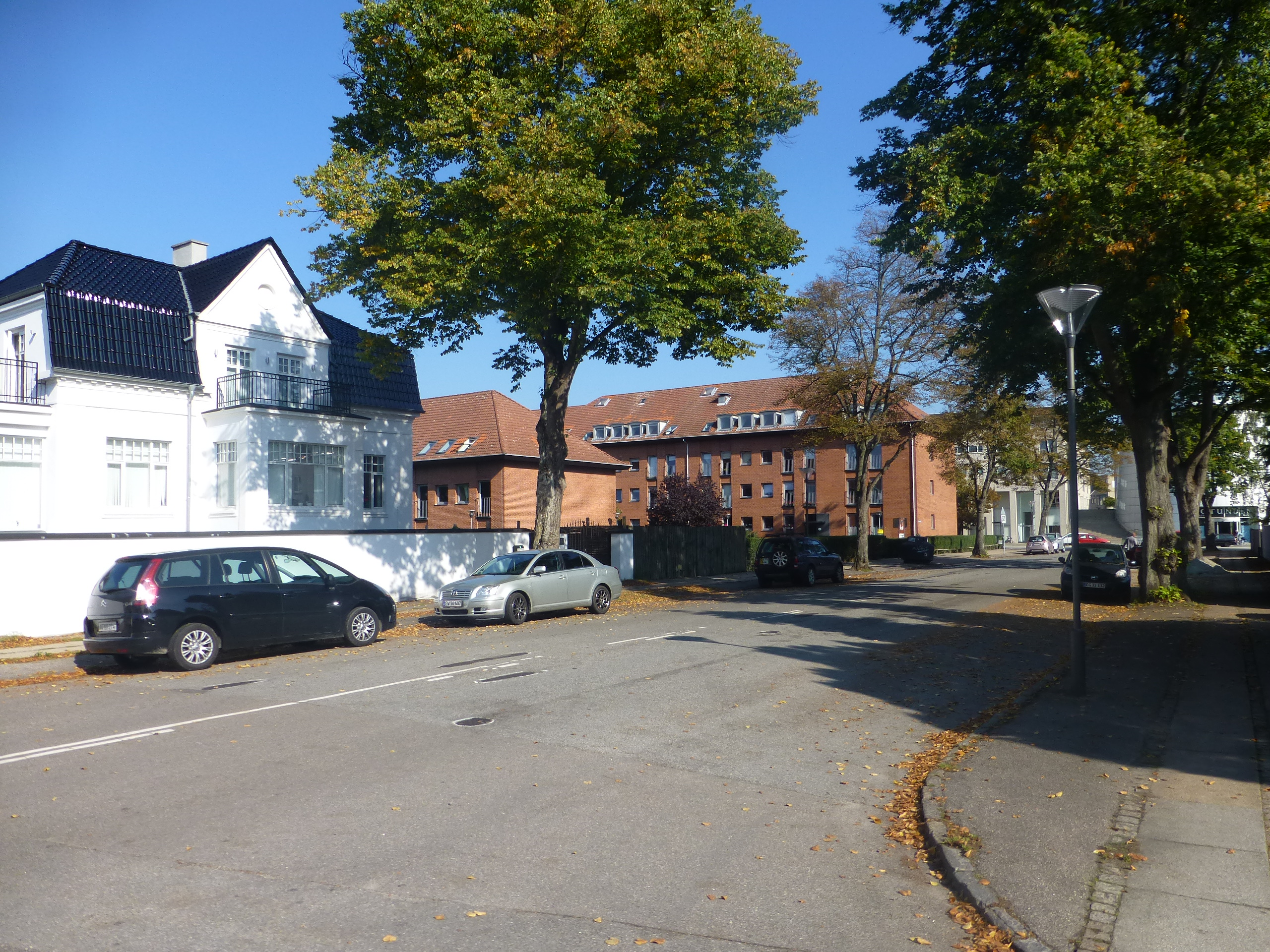 The street Ehlersvej in Hellerup in Copenhagen.